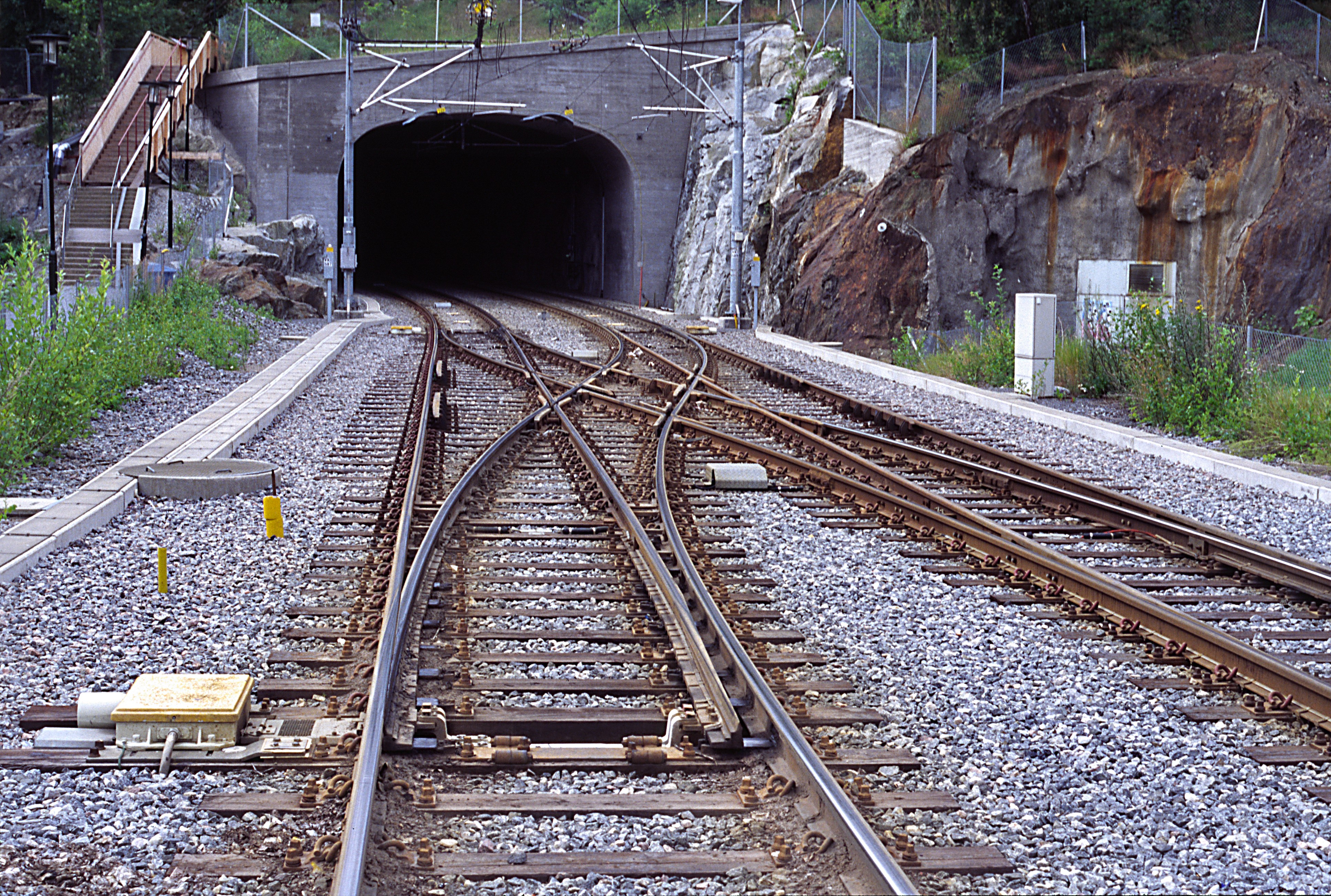 Tvärbanan Richtung Stora Essingen. Bislang wird in Alvik nur ein Bahnsteiggleis befahren. Die Züge der Tvärbanan verkehren im Regelbetrieb rechts.